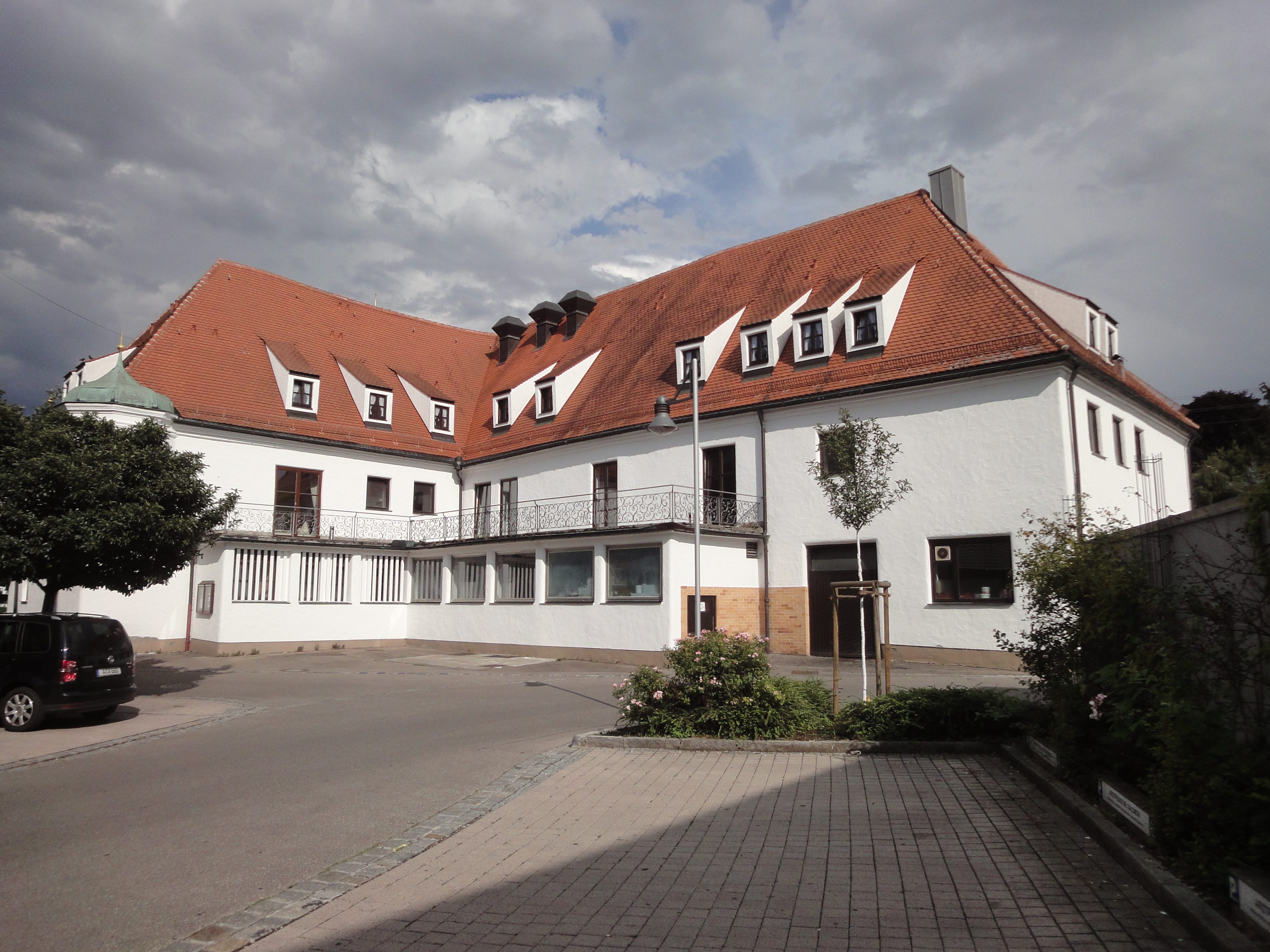 Gasthof in Neusäß-Steppach, zweigeschossiger, hakenförmiger Bau mit Walmdach, polygonalen Eckerkern und Zwerchhaus mit Krankbalken, 1783, der Nordostteil im Kern wohl 1. Viertel 17. Jahrhundert, 1958 und später modernisiert.